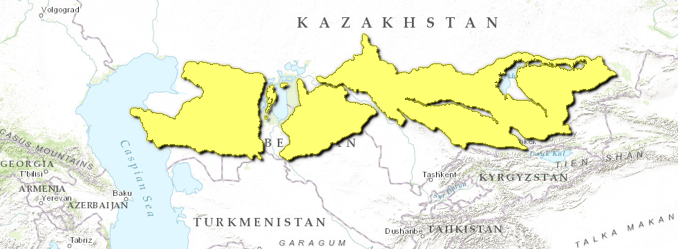 Mappa Ecoregione PA1310 - Deserto dell'Asia centrale settentrionale